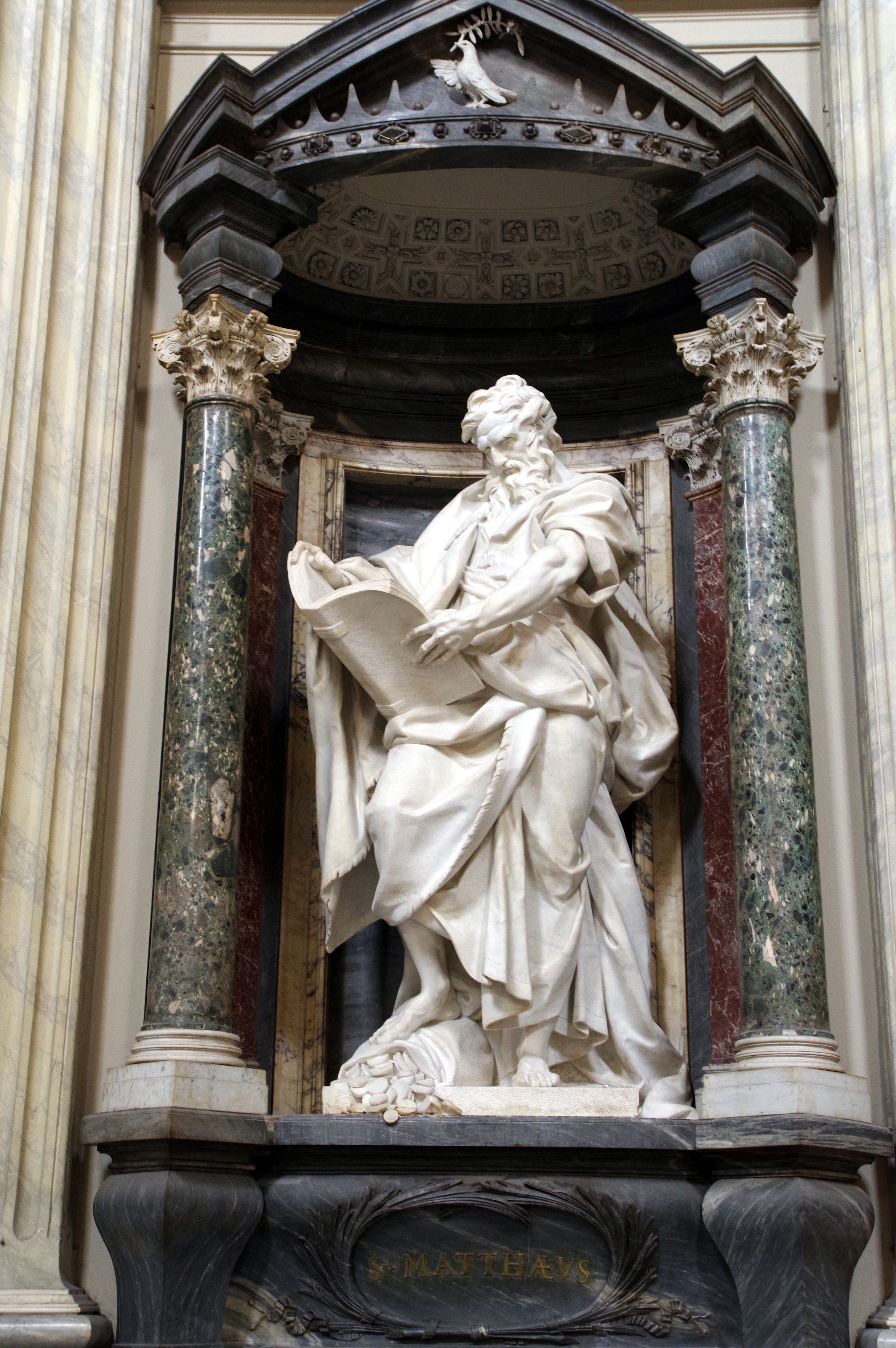 Statue de l'apôtre et évangéliste saint Matthieu à la basilique Saint-Jean-de-Latran à Rome.